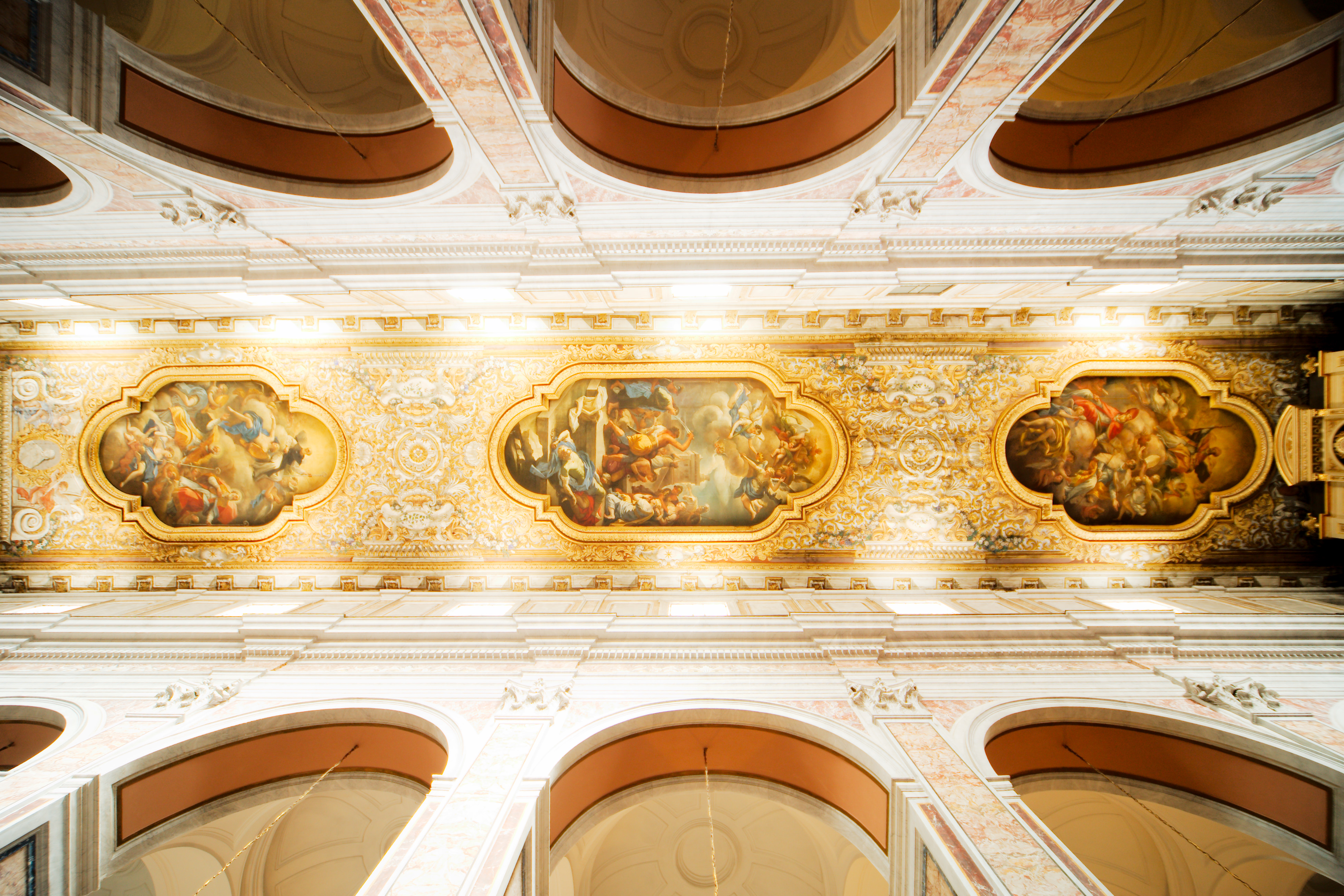 Duomo di Sorrento